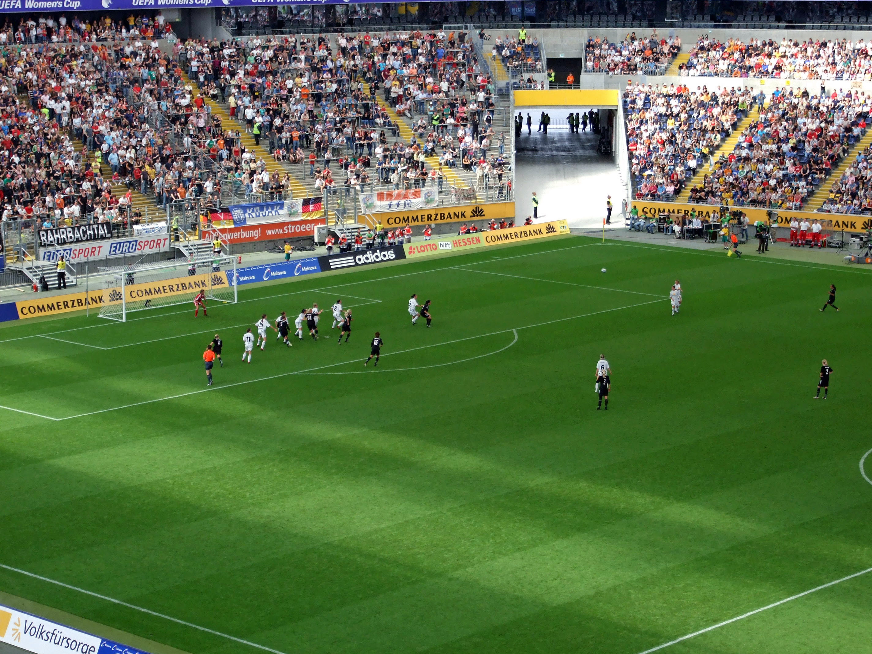 1. Halbzeit, Freistoss von Umeå gegen den 1. FFC, Commerzbank-Arena bei dem UEFA-Women's-Cup 2007/2008, Finalrückspiel zwischen 1. FFC Frankfurt und Umeå IK damfotboll